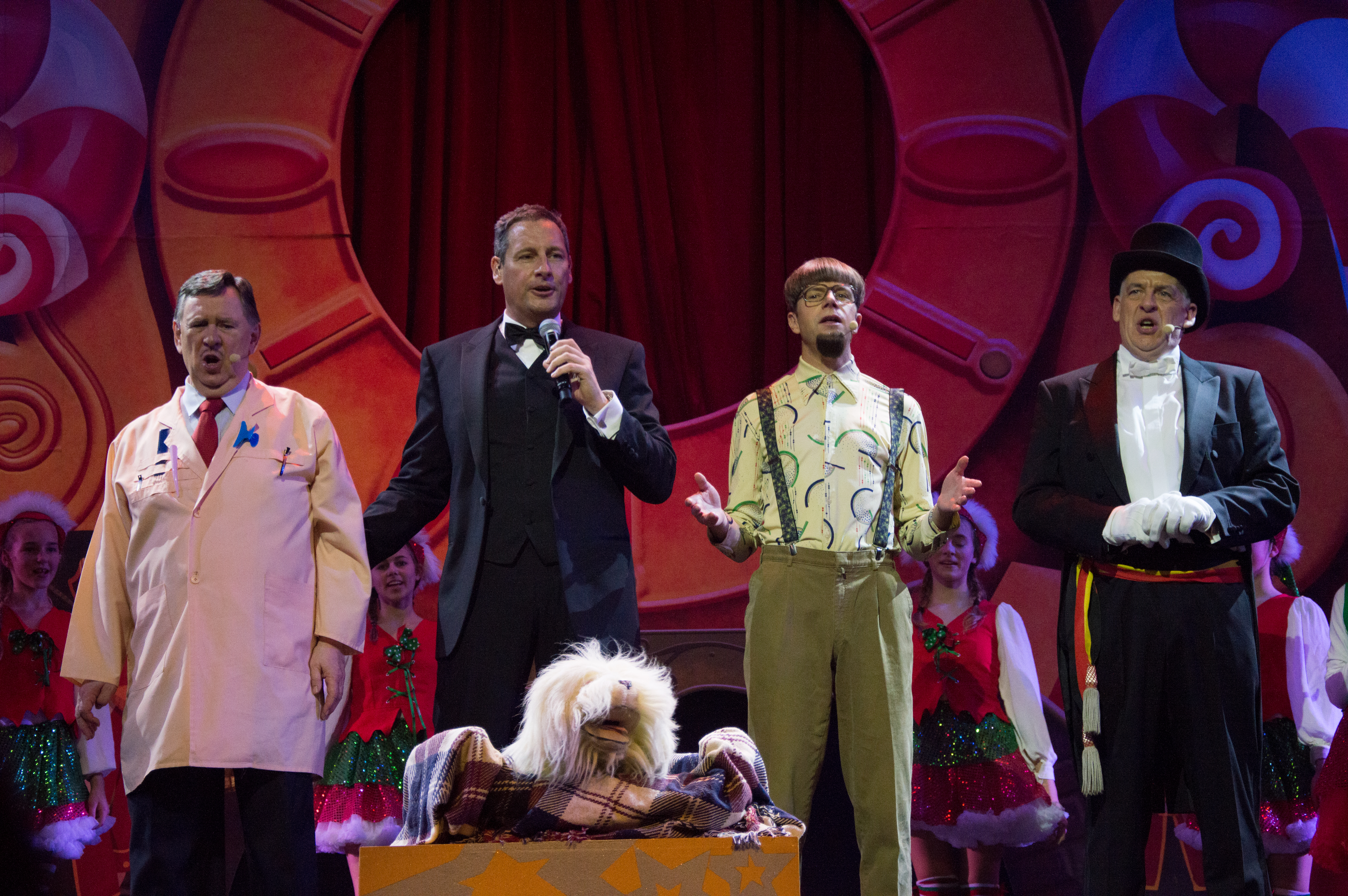 Koen Crucke, Gert Verhulst, Walter Baele, Walter de Donder